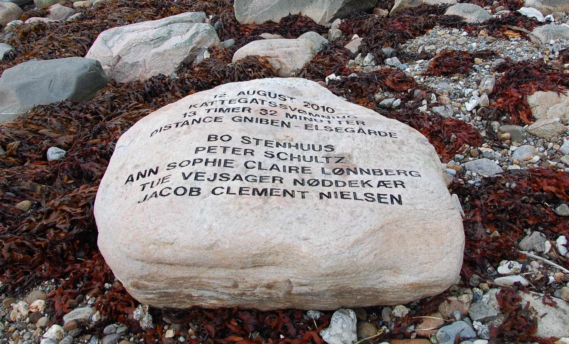 Gnibben Schwimmerstein von 2010